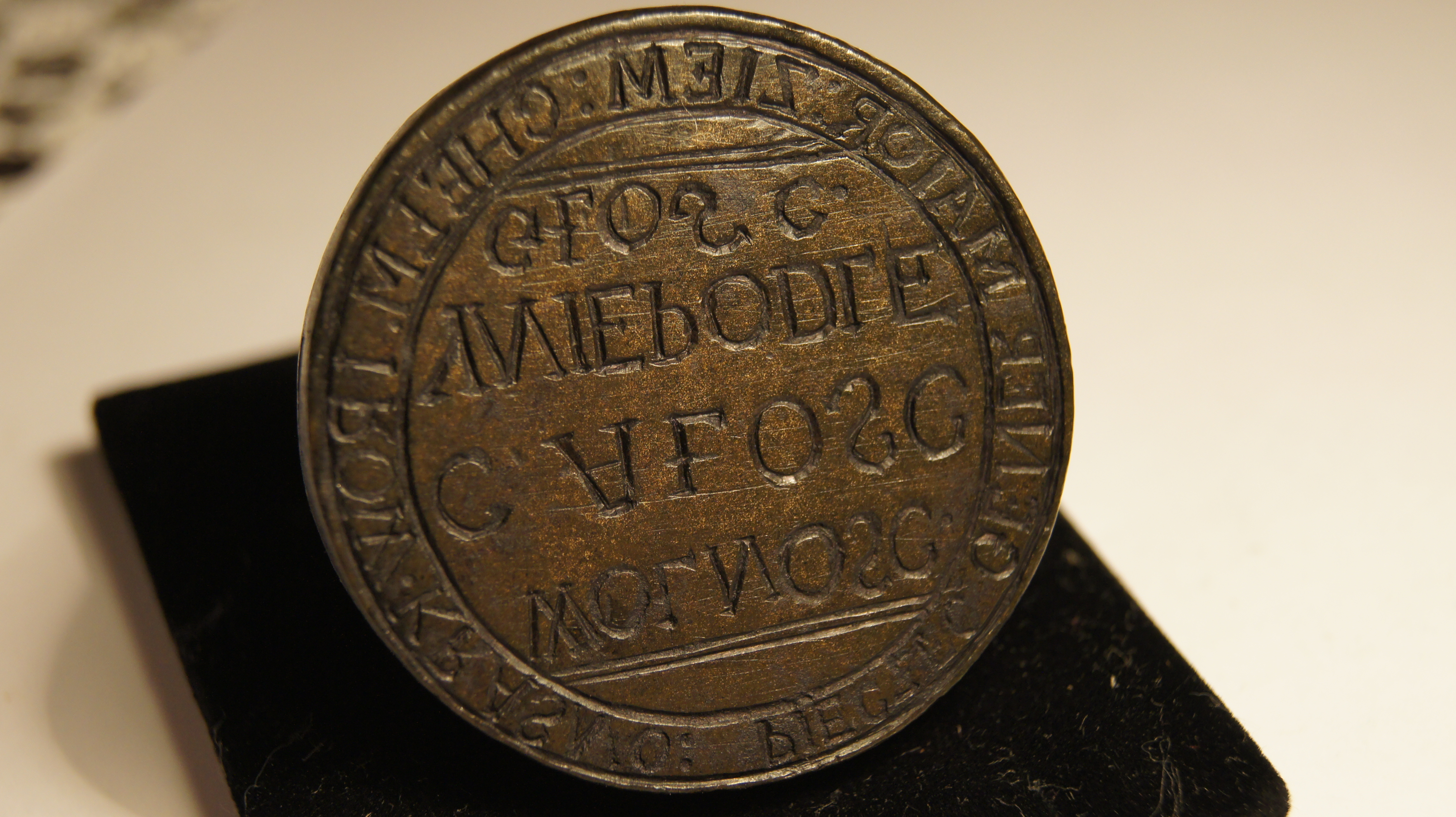 Pieczęć należąca do Tomasza Wydżgi z okresu powstania kościuszkowskiego 1794r treść pieczęci: Pieczęć Gener Maior Ziem Chełm I Pow Krasno Wolnosc Całość YNepodległość. Jest to jedna z pamiątek Insurekcji Kościuszkowskiej która zanjdowała się na pałacu w Wożuczynie